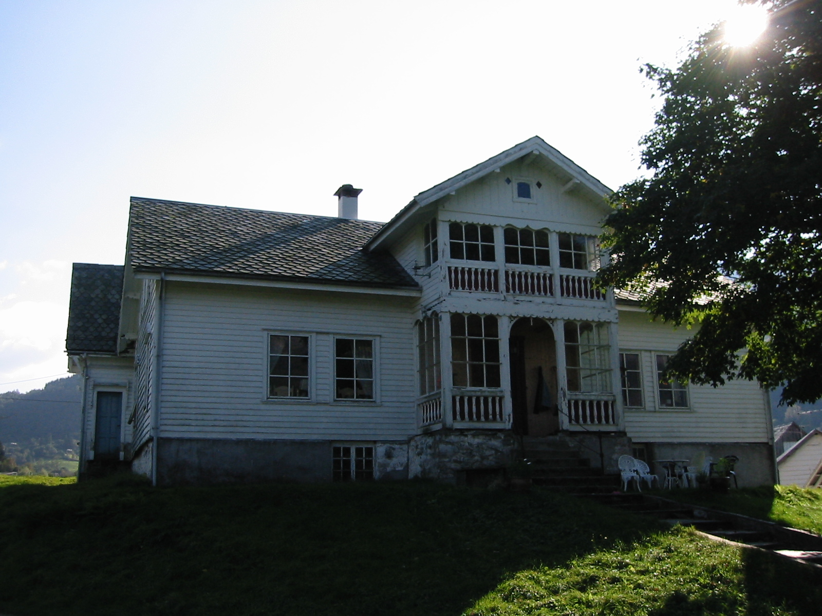 Nikka Vonens Pigeinstitutt i Dale i Sunnfjord. Foto Arild Nybø